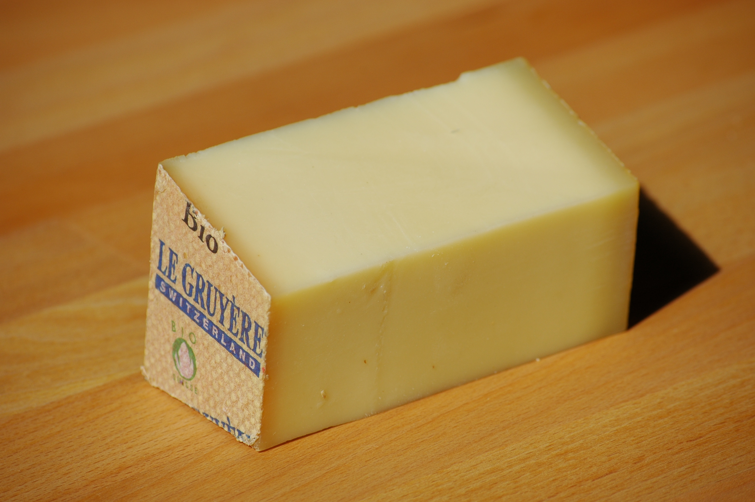 Greyerzer